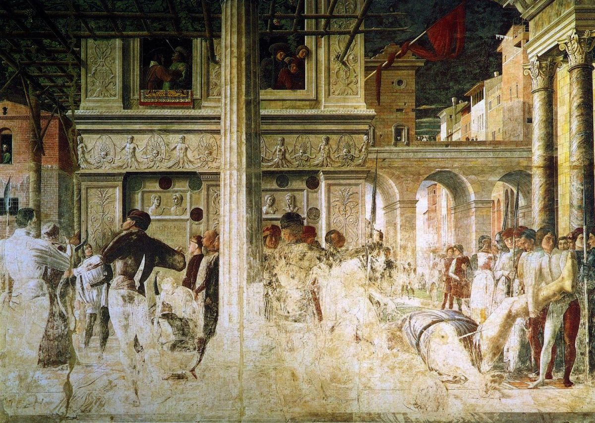 damaged frescos